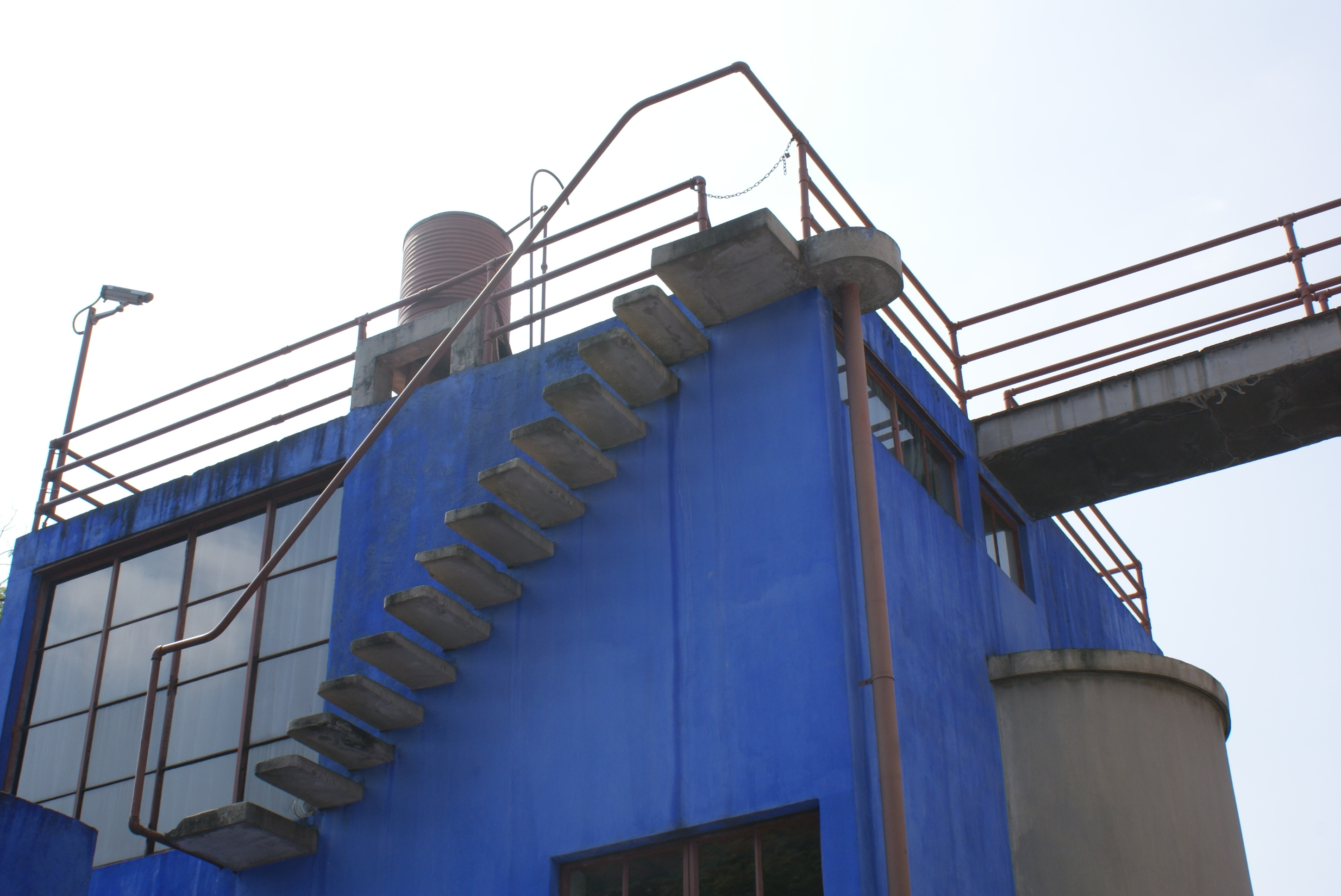 Parte trasera de la casa de Frida Kahlo en el Museo Casa Estudio Diego Rivera y Frida Kahlo. Se aprecia una de las innovadoras escalinatas del complejo por su peculiar barandal y escalones volados.